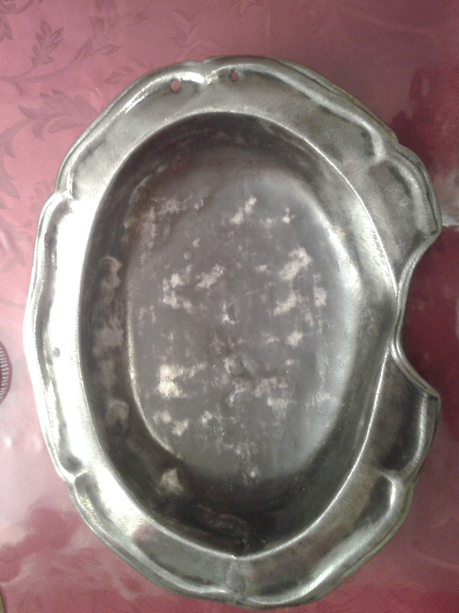 Bacía o bandeja de afeitar realizada en Peltre y plata. S XIX